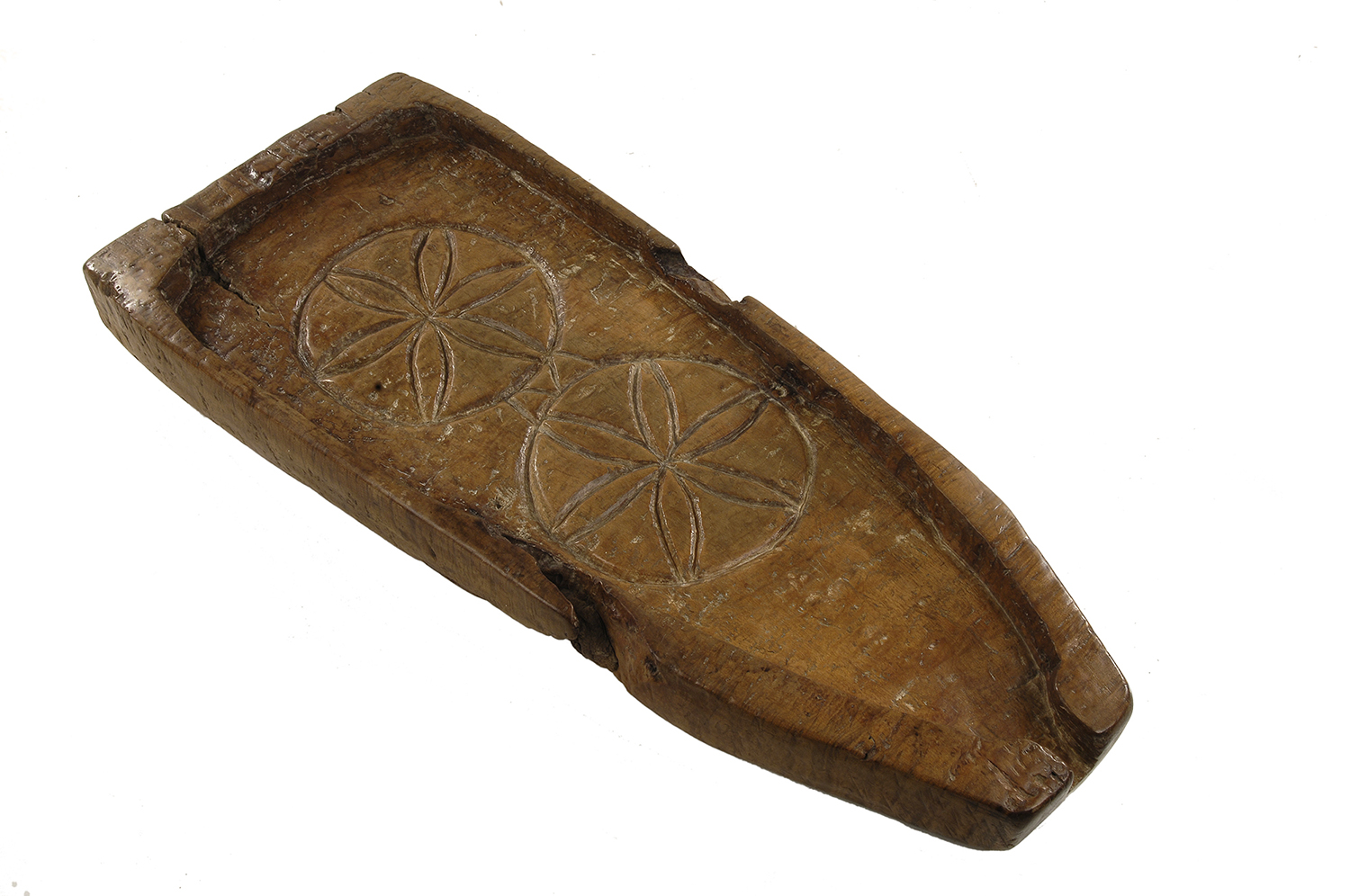 Fotografies dels objectes de l'exposició permanent de la sala "Secà i Muntanya" del Museu Valencià d'Etnologia - Fotografies de Mateo Gamon. Formatgera, Els Ports, segle XX.